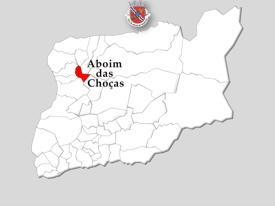 Censoa 1864/2011